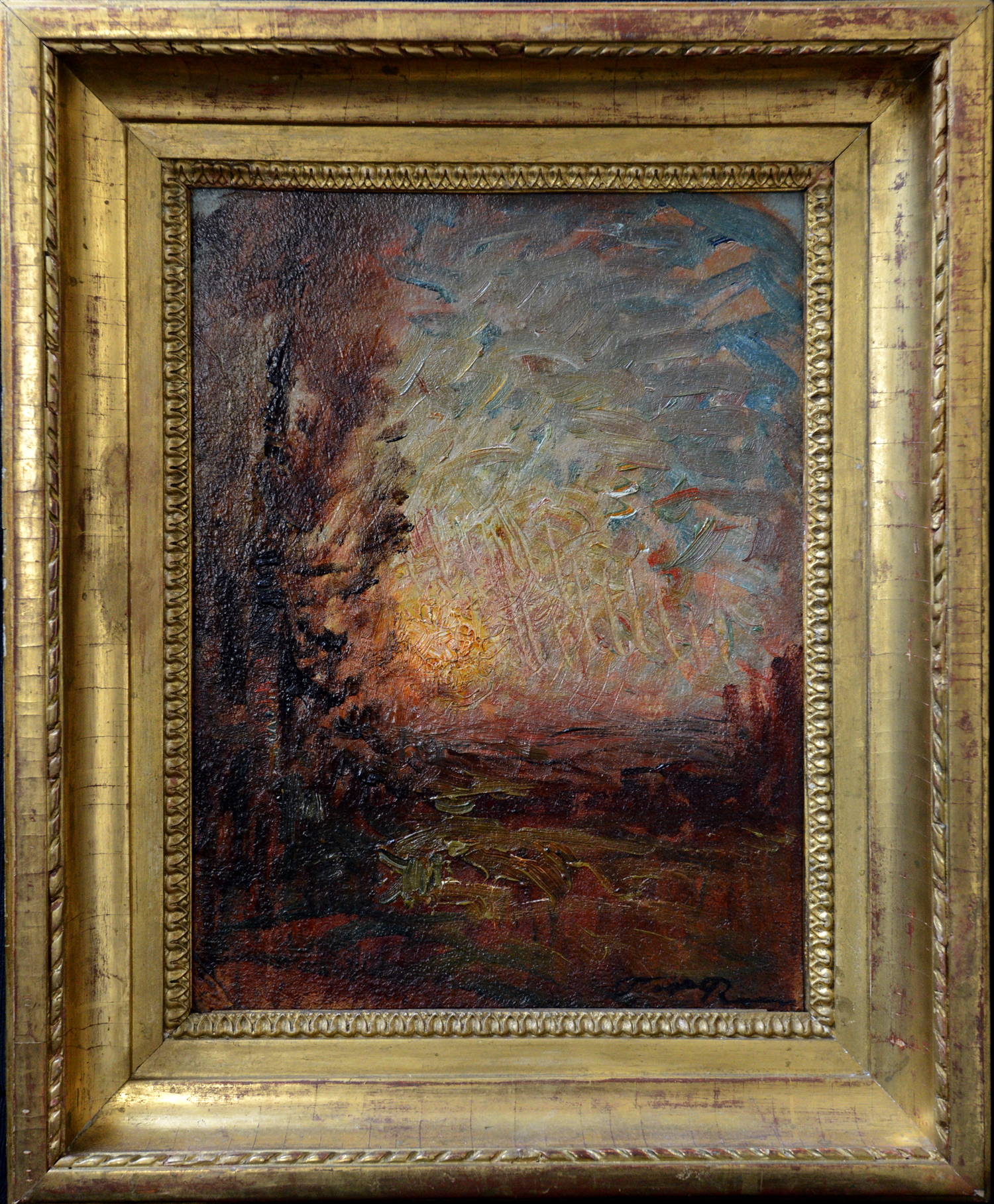 Huile sur carton, François-Auguste Ravier (collection particulière)